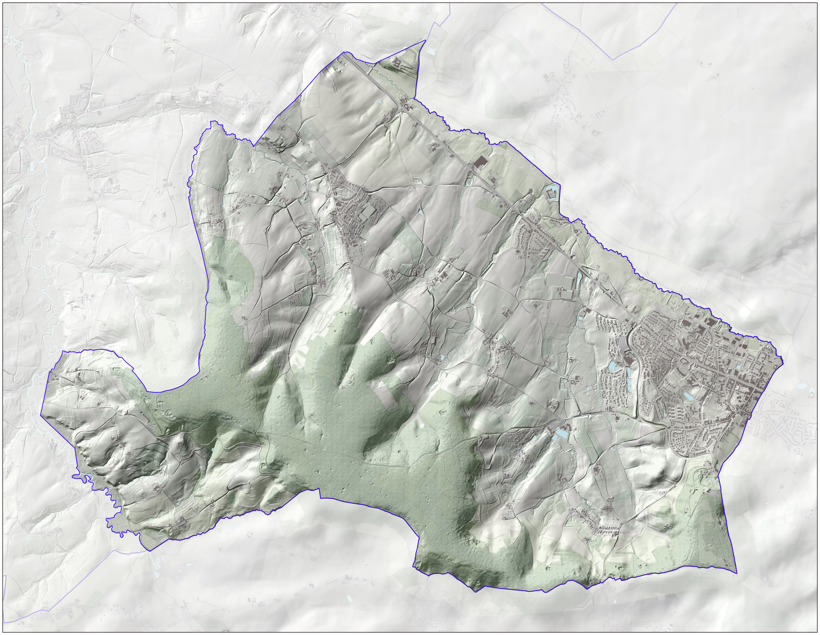 Reliëfbeeld van de gemeente, o.b.v. het Actuele Hoogtebestand Nederland (AHN2, open data) met subtiele elementen uit de Basisregistratie Topografie (BRT/Top10NL, open data). Kaartbeeld samengesteld door Jan-Willem van Aalst.